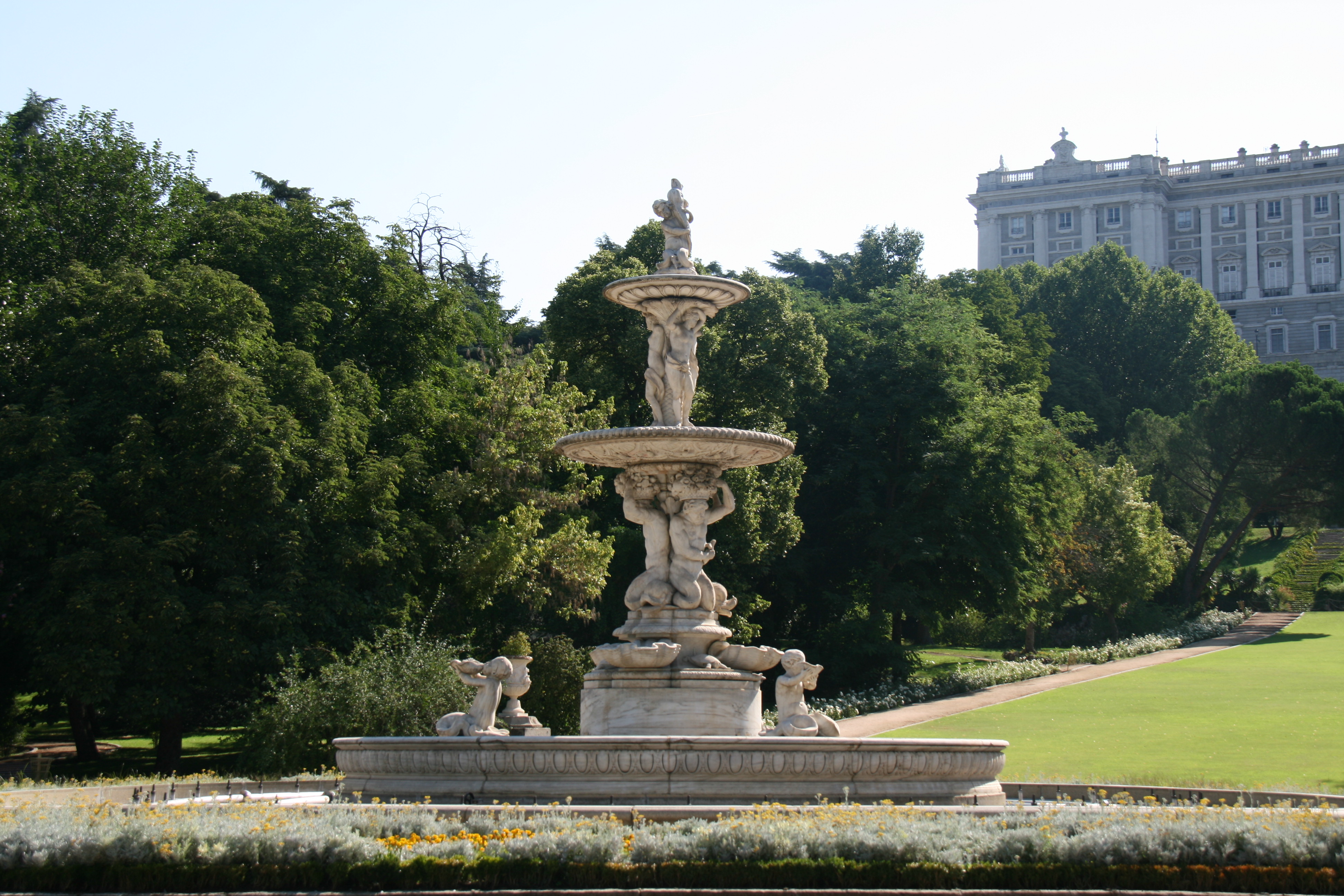 Fuente de las Conchas (Madrid) - Campo del Moro